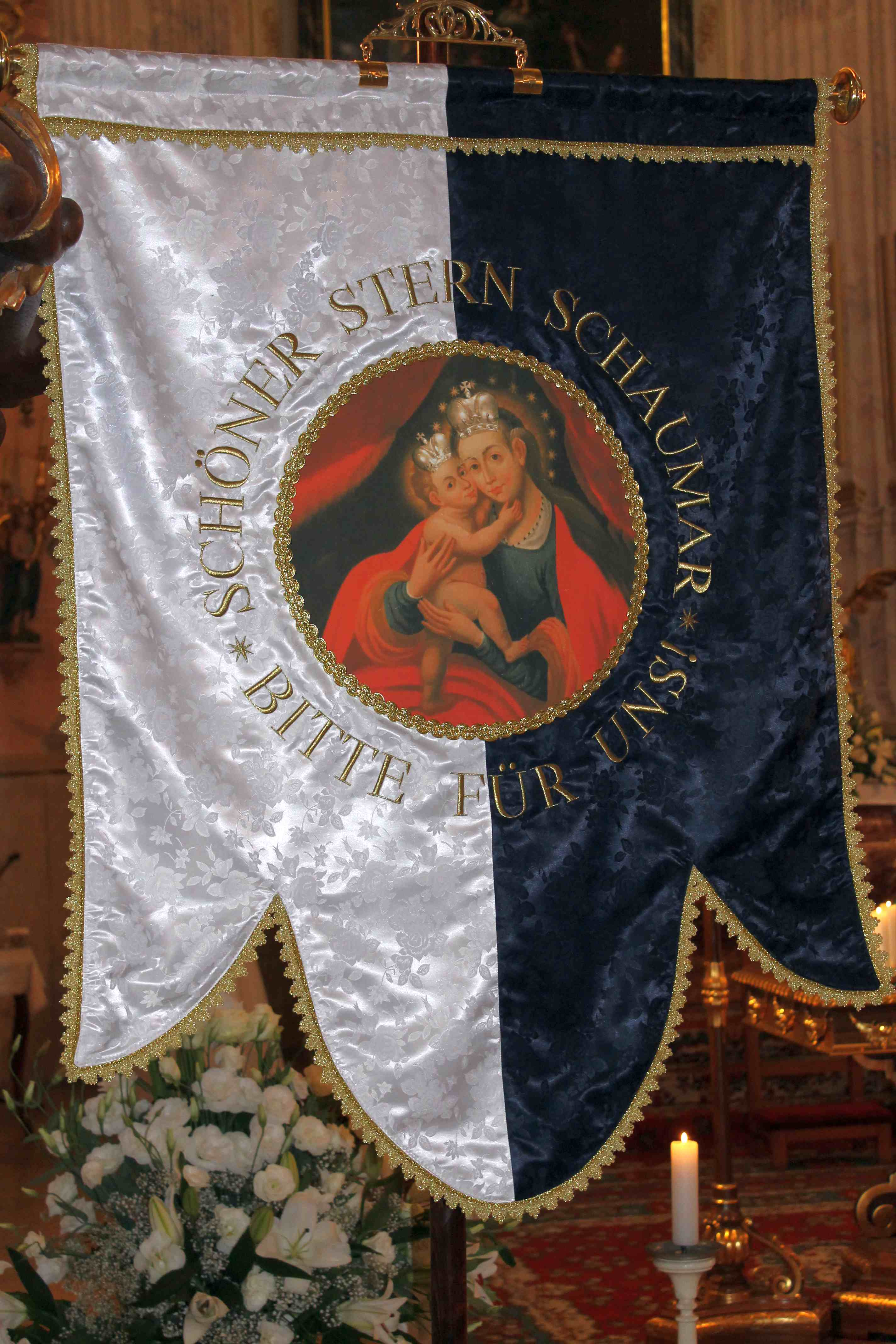 A solymári egyházközság zarándokzászlaja